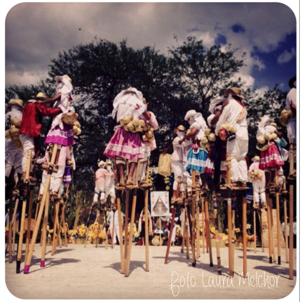 Fiesta grande del cerro en Zaachila